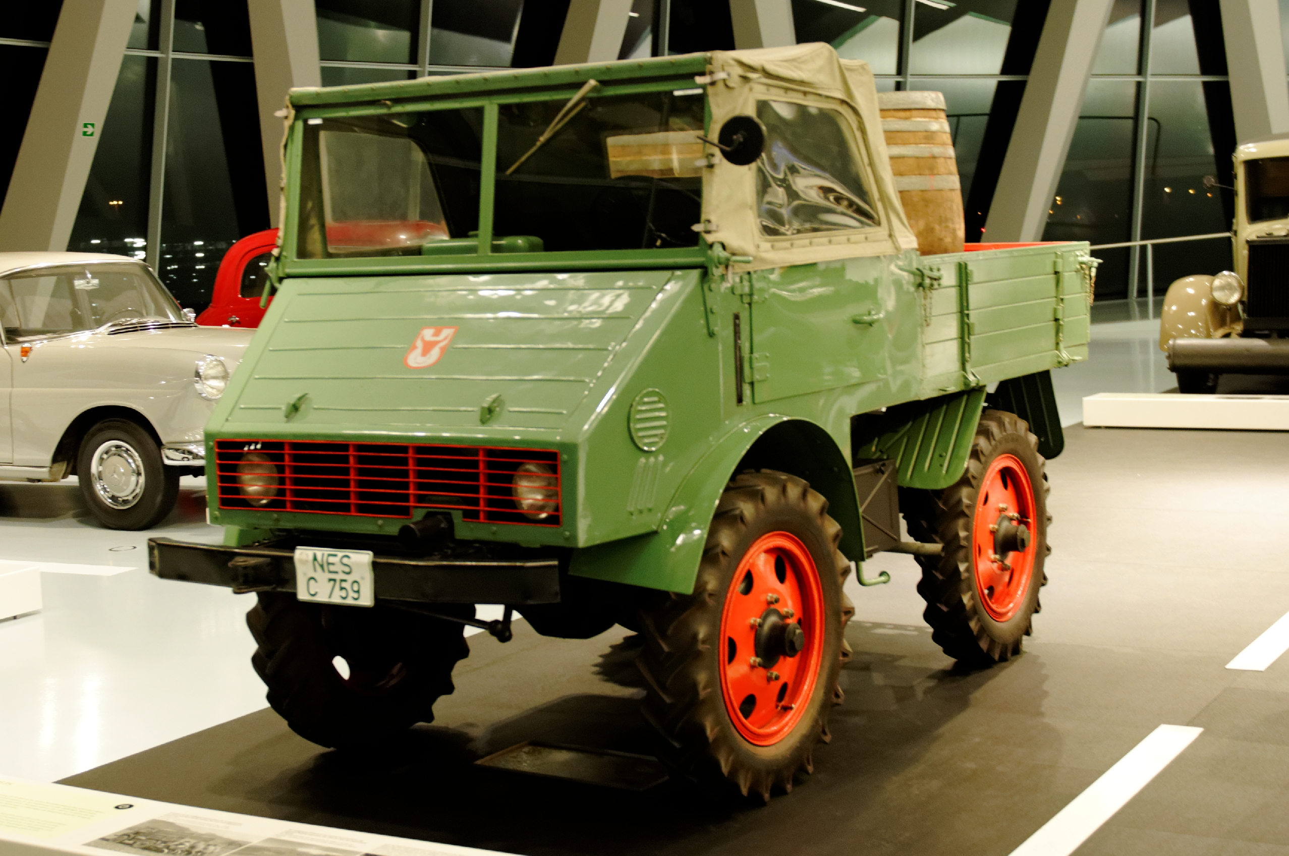 Bilder aus dem Mercedes-Benz-Museum 2015